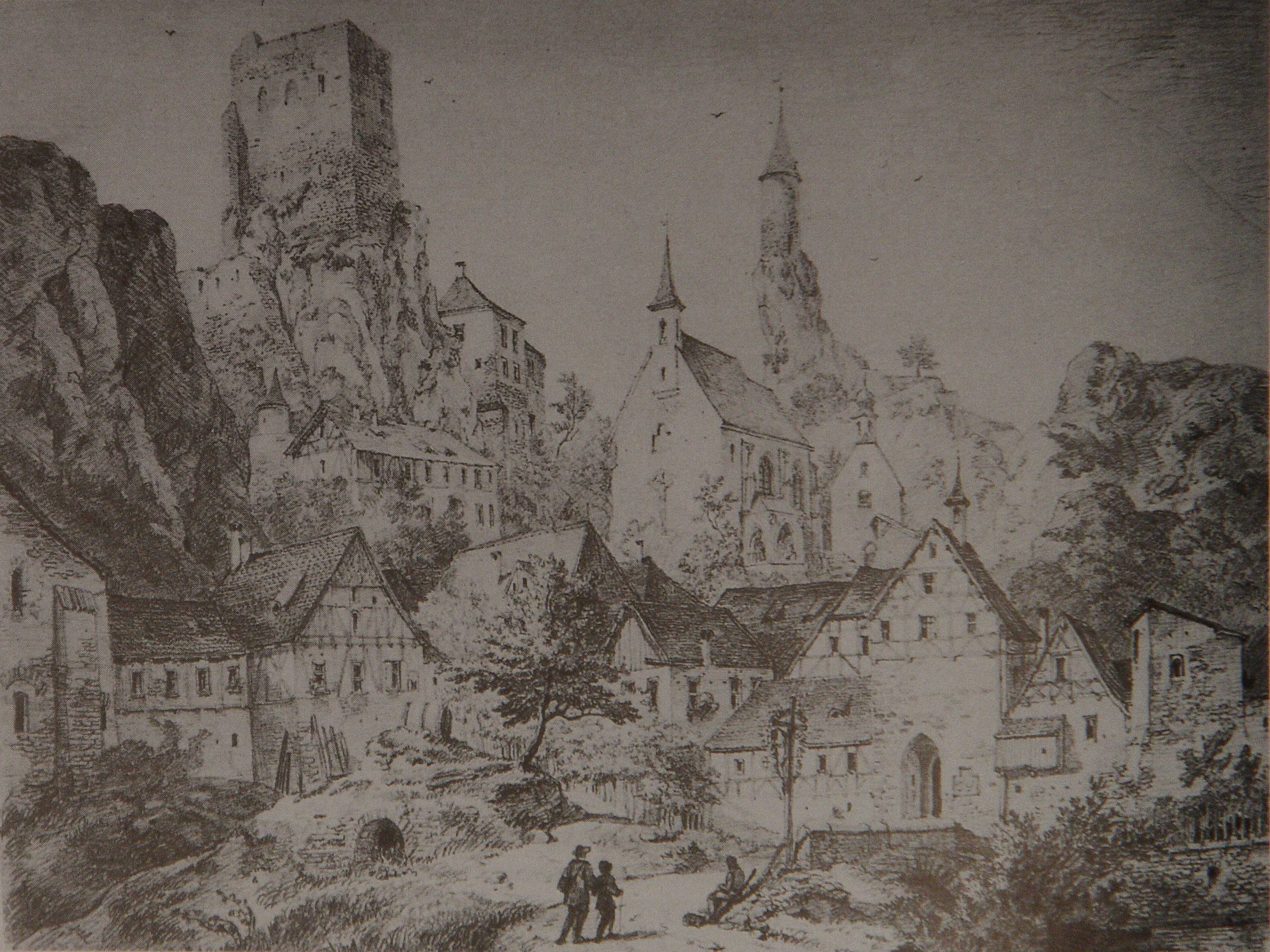 Waischenfeld auf einer Bleistiftzeichnung von Domenico Quaglio aus dem Jahr um 1830